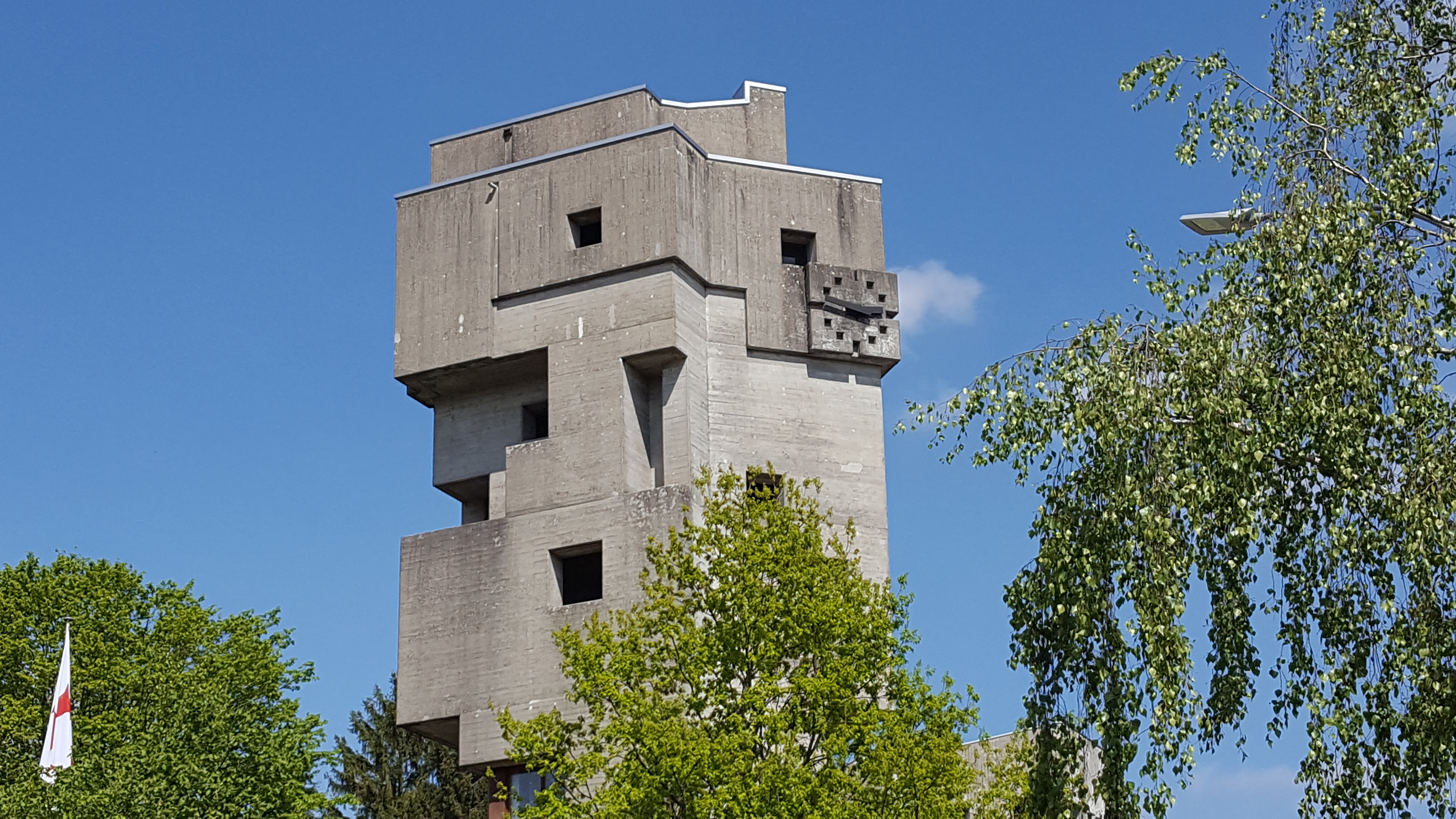 Sankt Klemenz Kirche